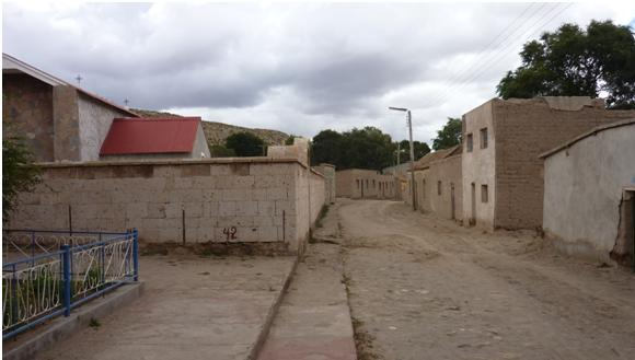 Villa Alota, Municipio de San Martín, Provincia de Enrique Baldivieso, Departamento de Potosí, Bolivia